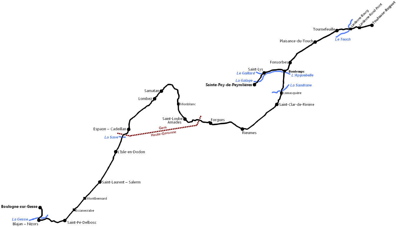 Schéma géographique de l'ancienne ligne de Toulouse à Boulogne-sur-Gesse